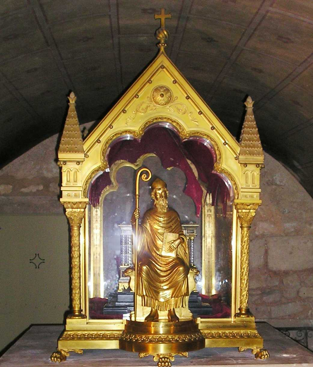 Saint-Hilaire-de-Poitiers, Reliqienschrein in der Krypta